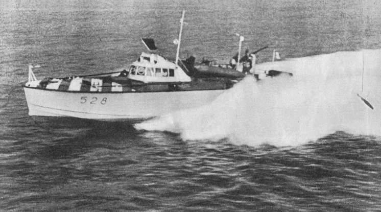 il MAS 528 uno dei protagonisti delle azioni italiane sul Lago Ladoga. I MAS « 527 » e « 528 » al comando del S. Tenente di Vascello Bechi affondarono nell'agosto del 1942 una cannoniera russa ed un trasporto carico di munizioni, distinguendosi inoltre in altri scontri con unità sovietiche.